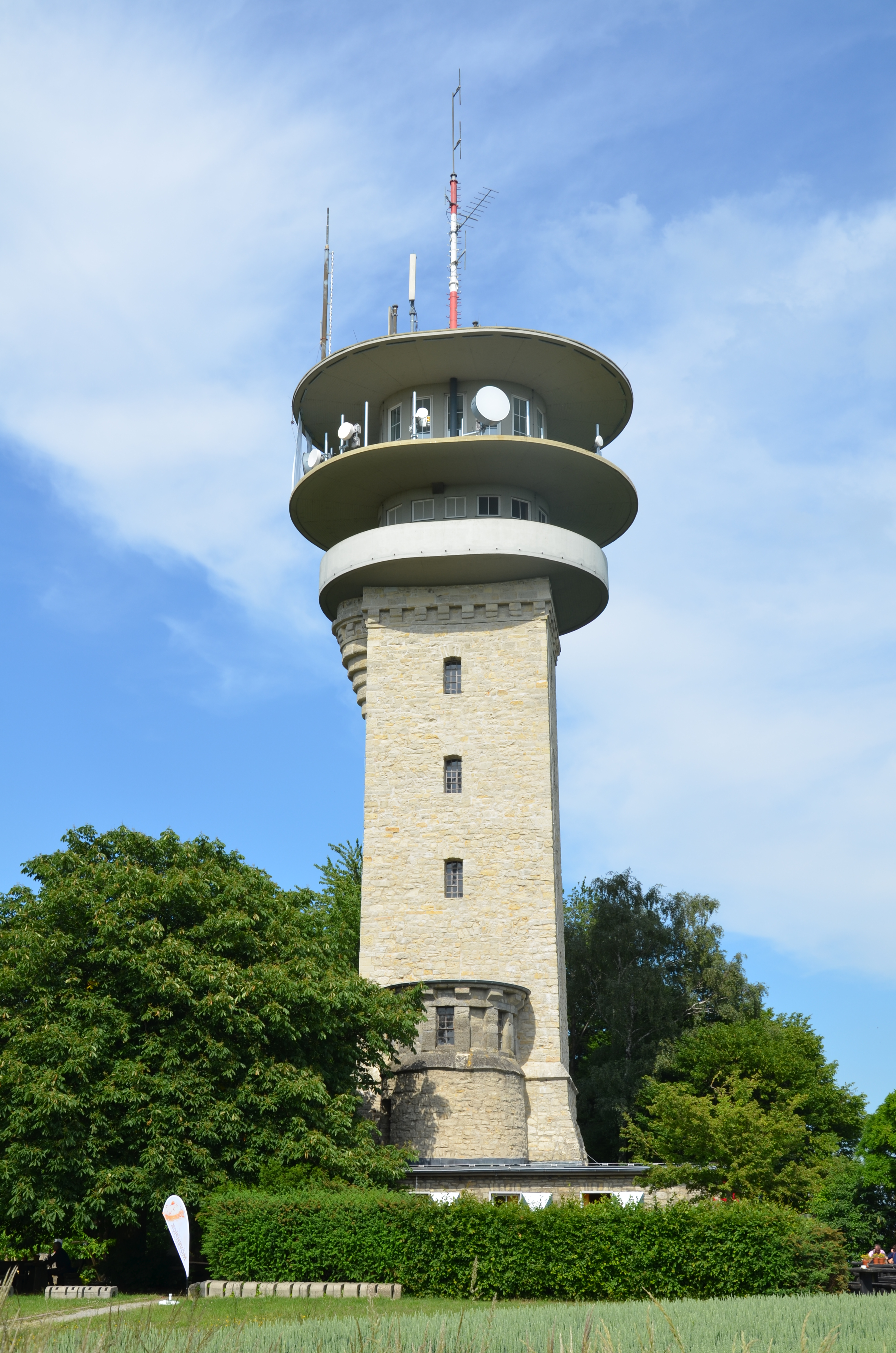 Longinusturm auf dem Westerberg in den Baumbergen im Münsterland